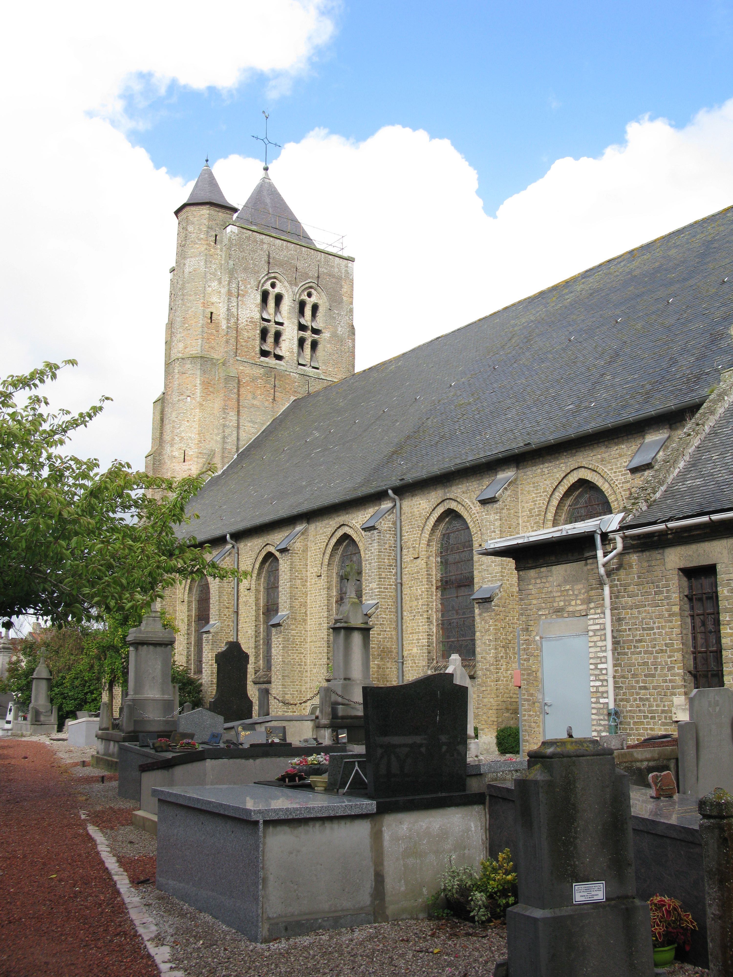 Eglise Saint-Omer de Brouckerque, vue du cimetière côté sud.